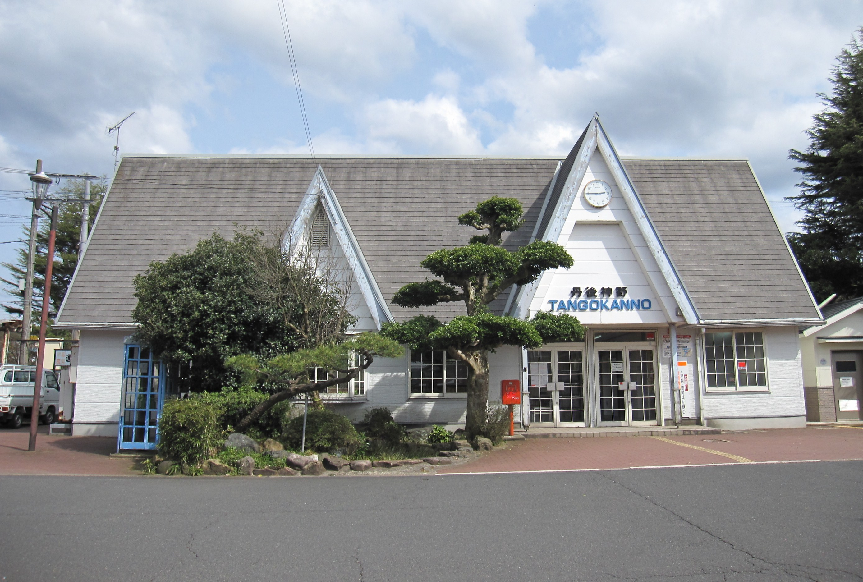 北近畿タンゴ鉄道 丹後神野駅